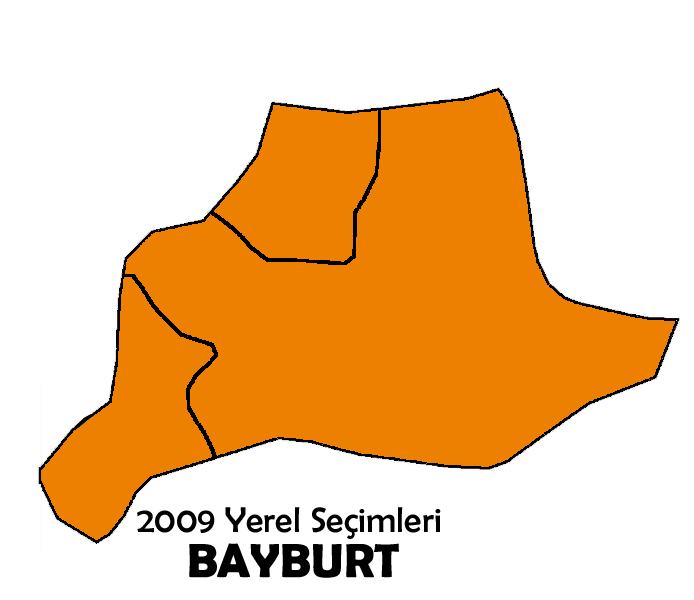 2009 Türkiye yerel seçimleri